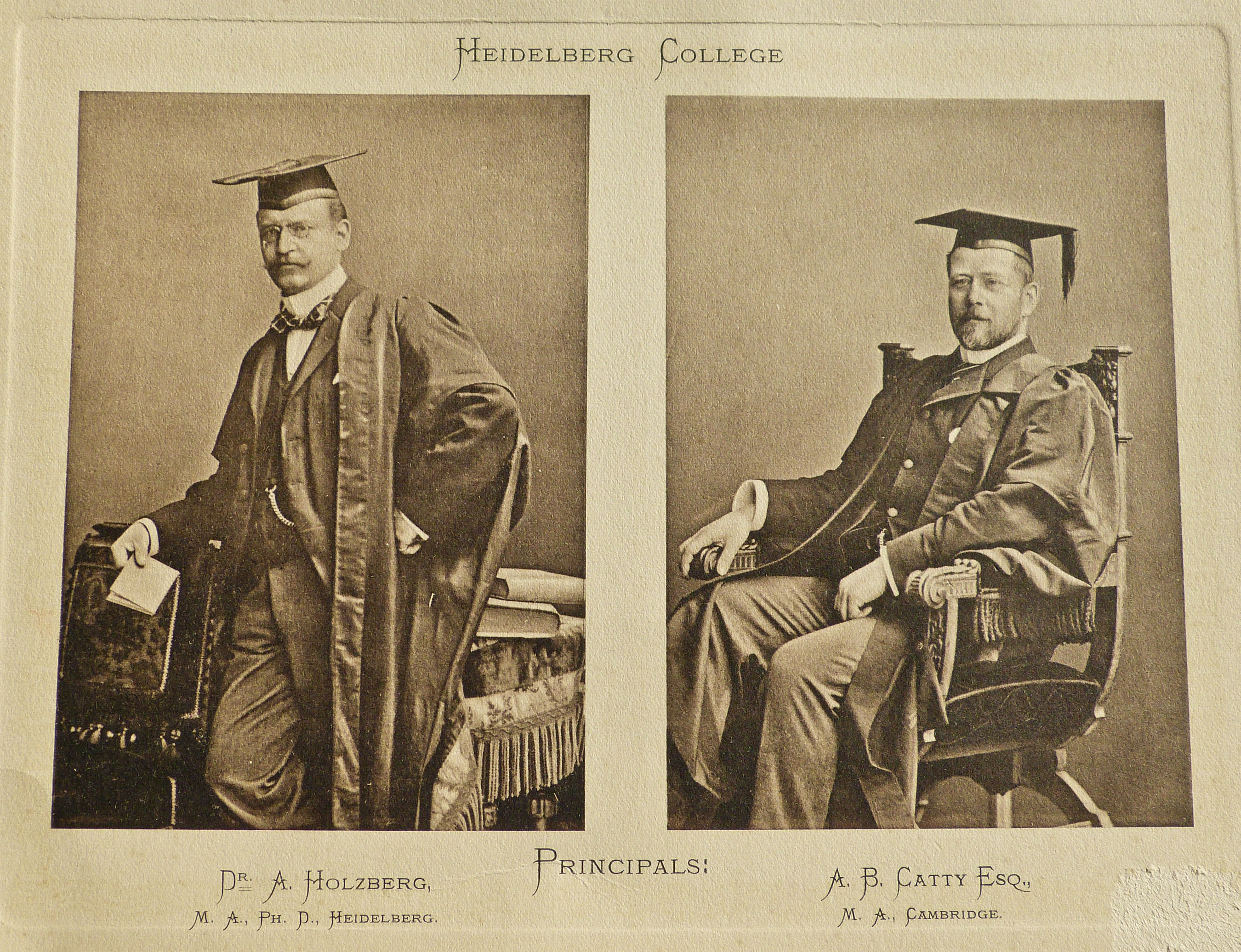 Arthur Bovill Catty und Albert Holzberg